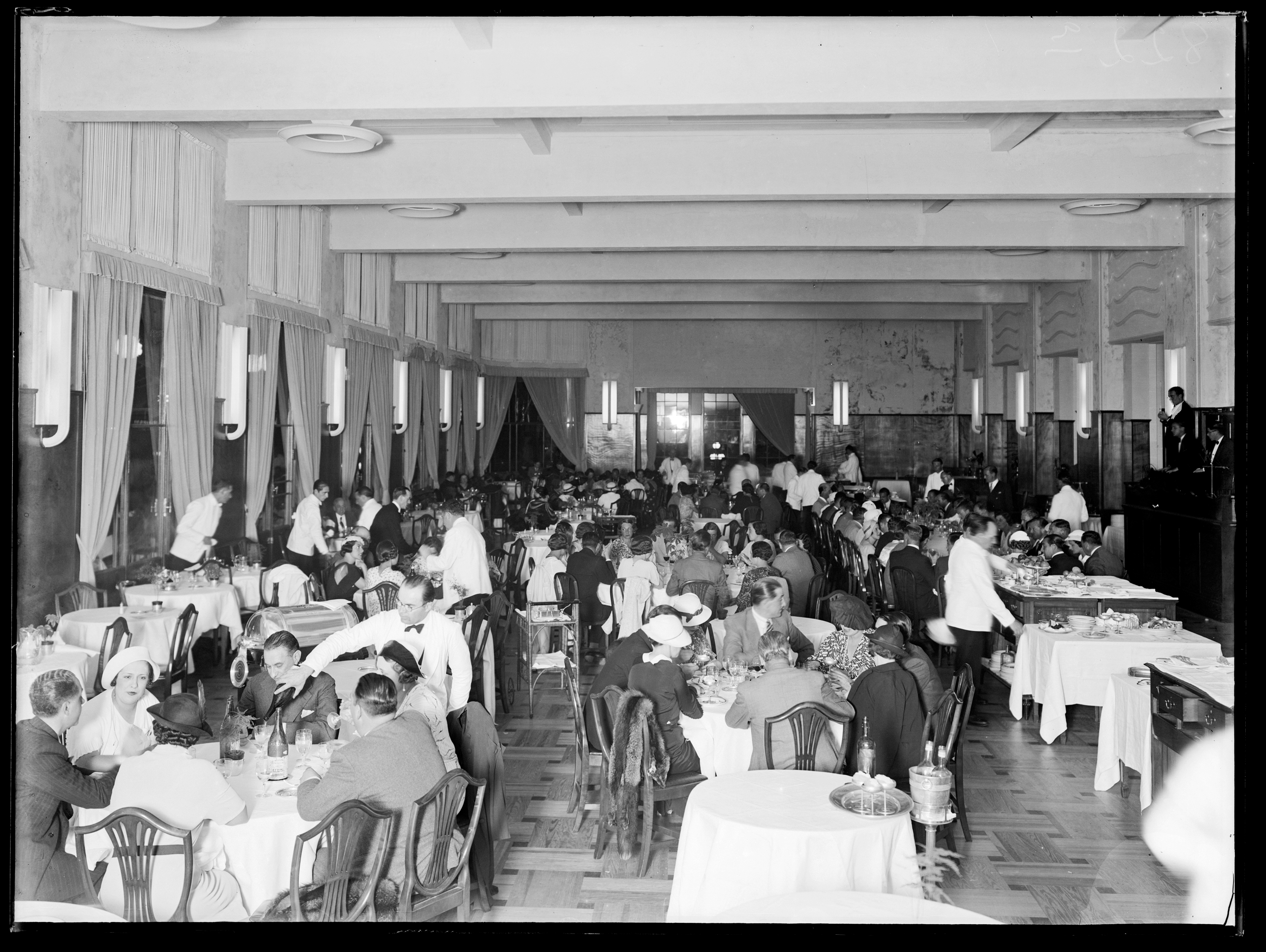 Salón Comedor del Hotel Carrasco.